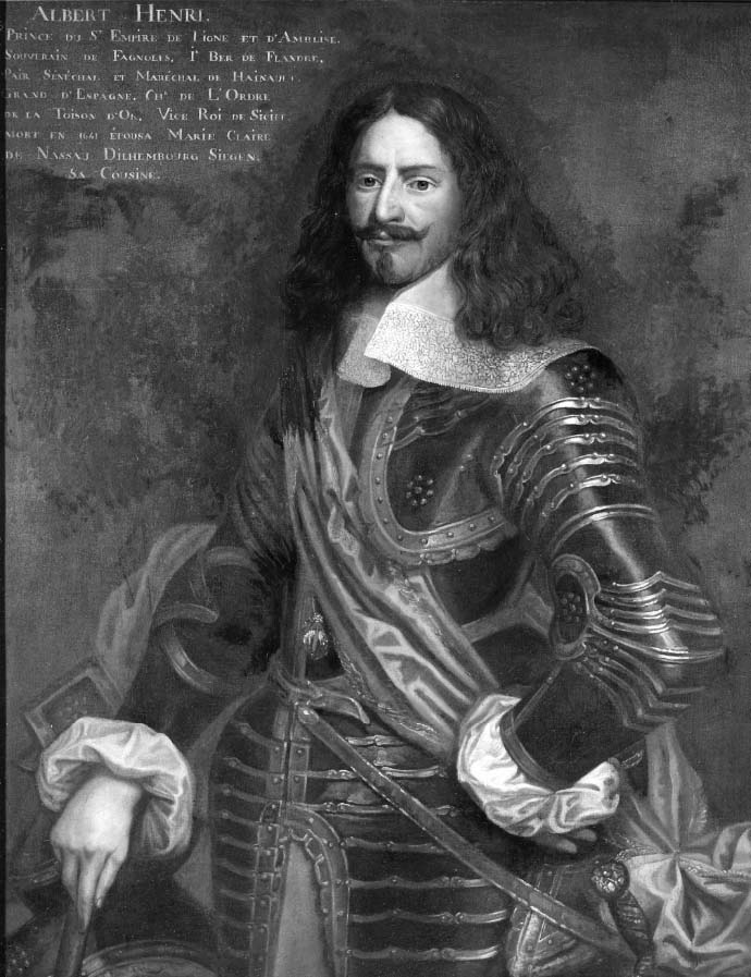 Portrait de Prince Albert Henri de Ligne